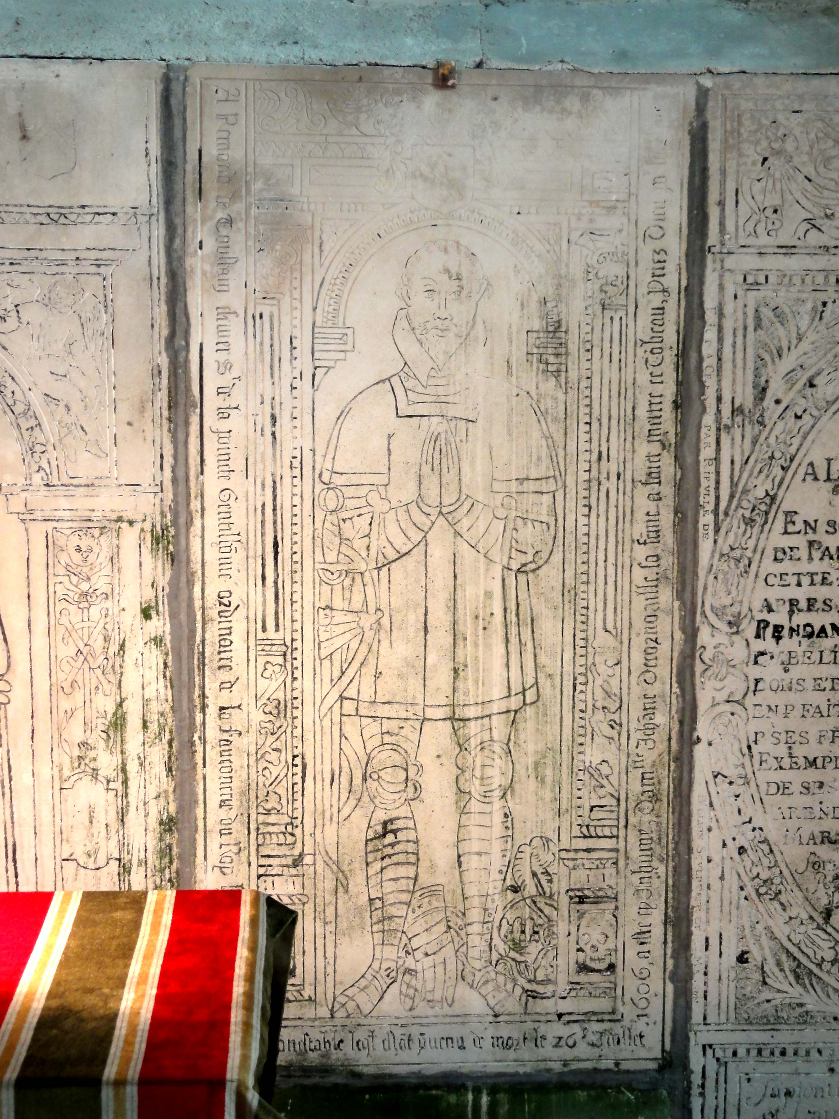 Mobilier de l'église Saint-Sulpice de Béthancourt-en-Valois - voir titre.